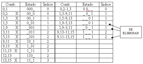 Tabla ejemplo de simplificación numérica